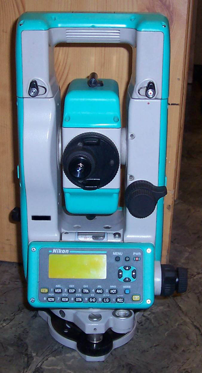 Tachimetr Nikon DTM-520 Author: user:Krzysiu